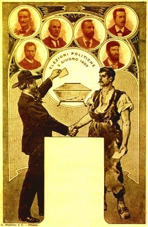 1900 - catolina di propaganda PSI per le elezioni politiche - Filippo Turati è l'ultimo in basso a destra Licensing socialisti Categoria:Immagini di Filippo Turati